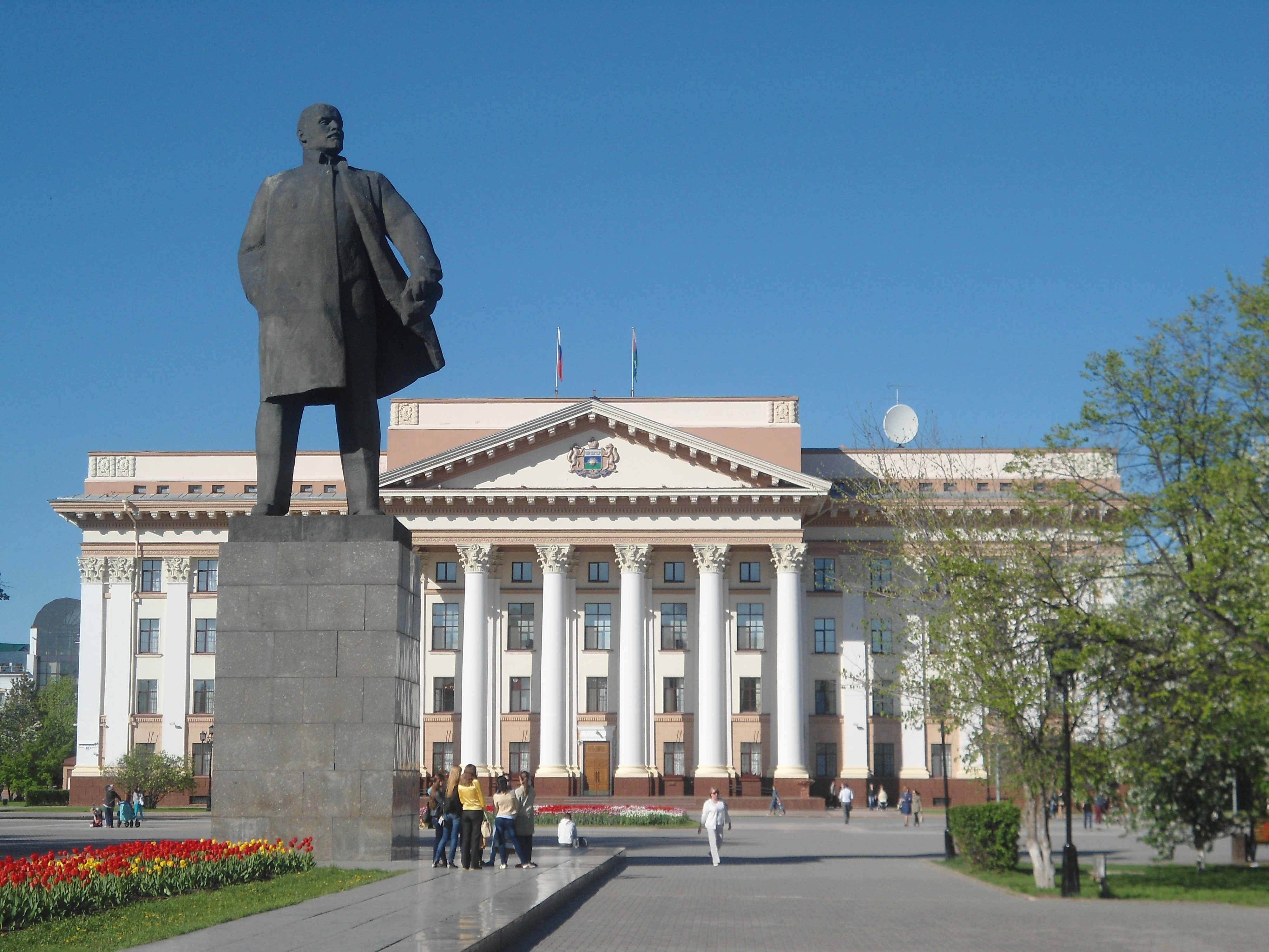 Tyumen Lenin